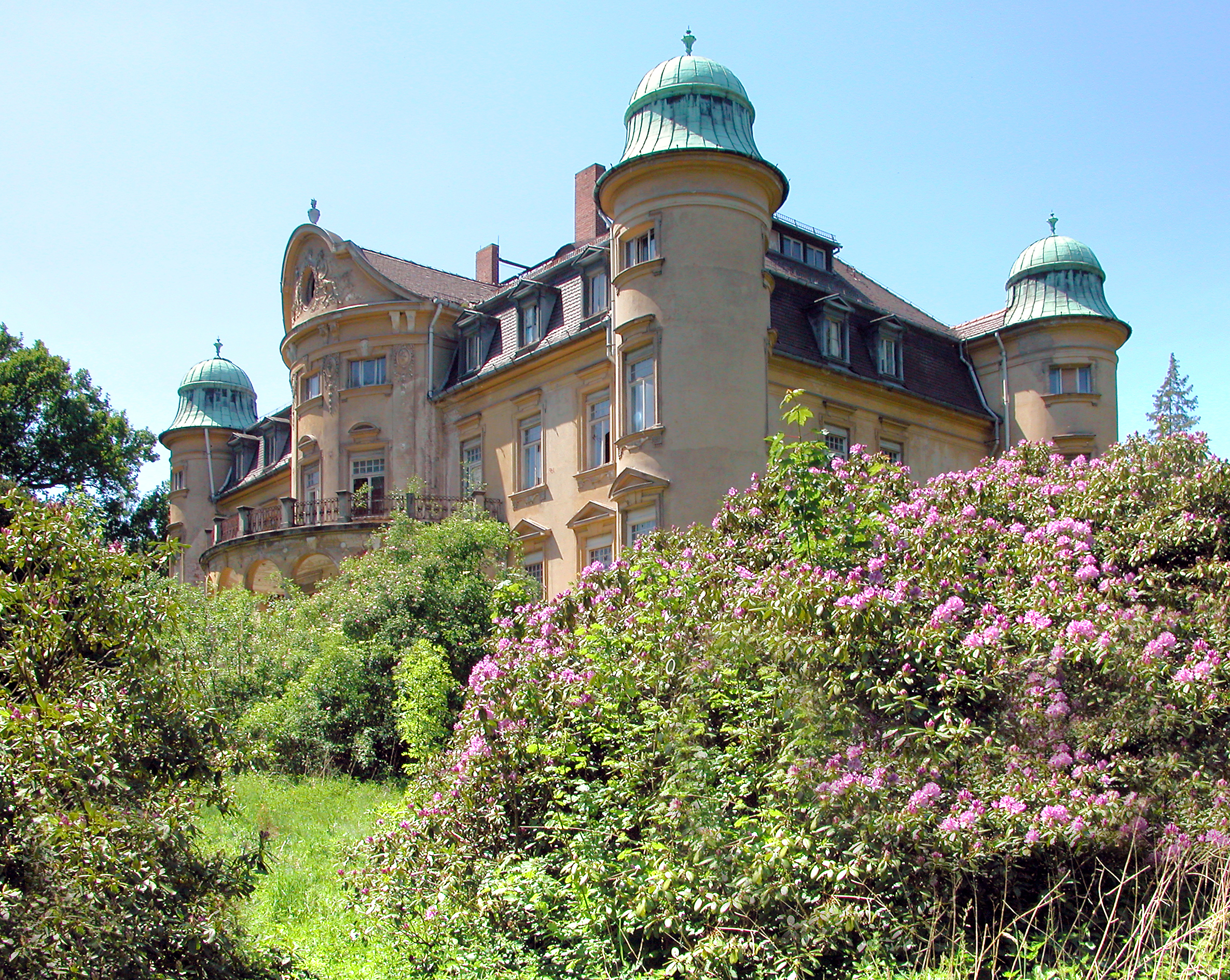 19.05.2007 02923 Rengersdorf (Kodersdorf): Neues Schloß Ober Rengersdorf, Bergstraße (GMP: 51.213558,14.893405). Erbaut 1900 - 1901 unter Julius von Roncador. In der DDR Grundschule, Schulhort und Kindergarten. Sicht von Nordosten. [DSCN28057.TIF]20070519135DR.JPG(c)Blobelt